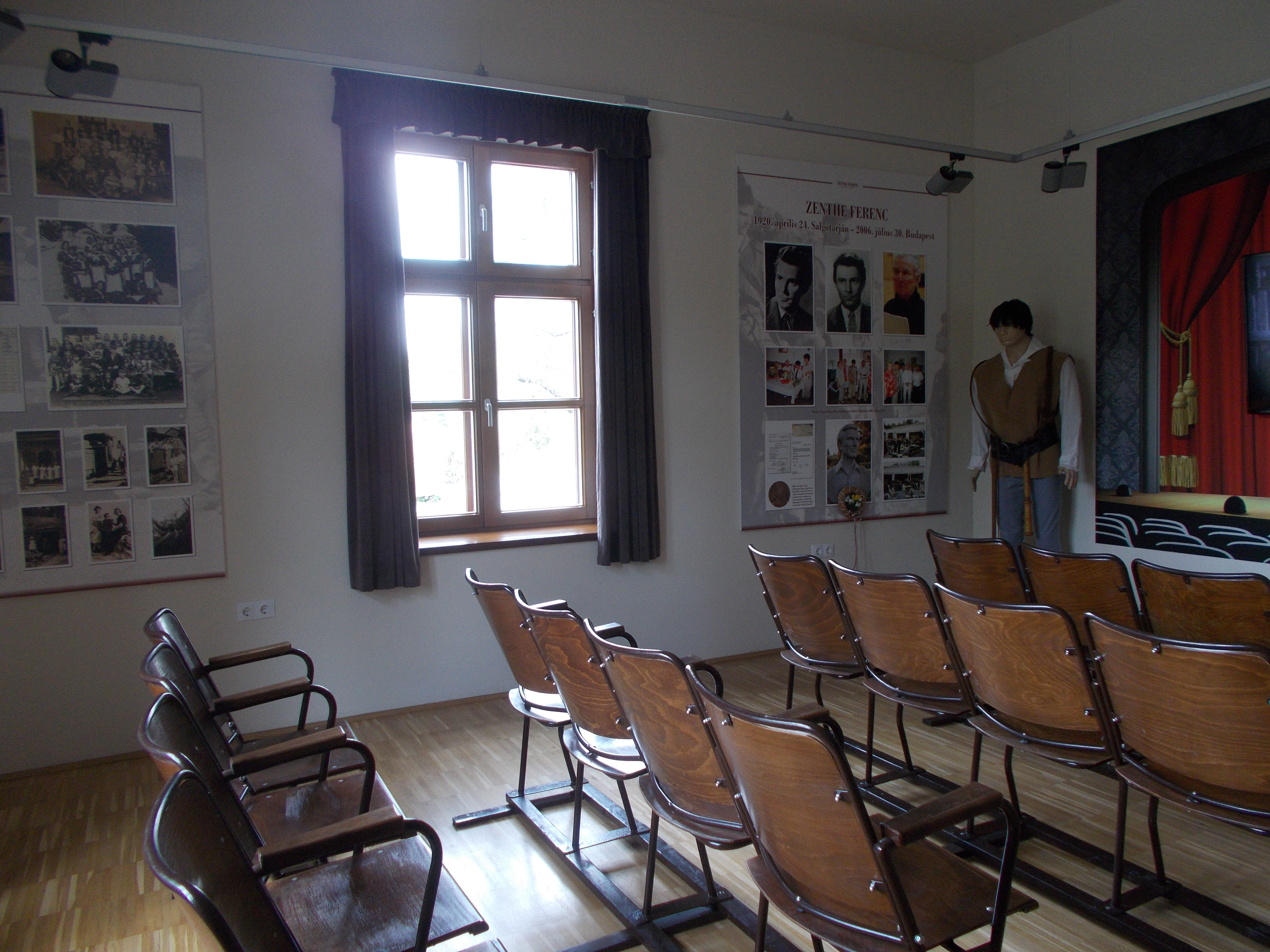 Zenthe Ferenc emlékszobája a salgóbányai kaszinóban